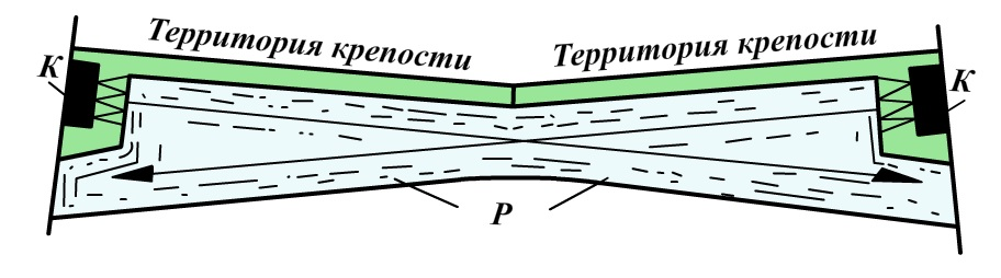 Простой капонирный фронт.